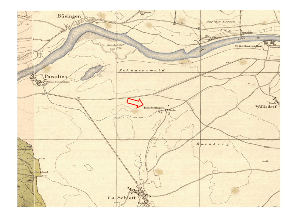 Wildkarte von 1869, Abschnitte Paradies und Diessenhofen zusammengesetzt